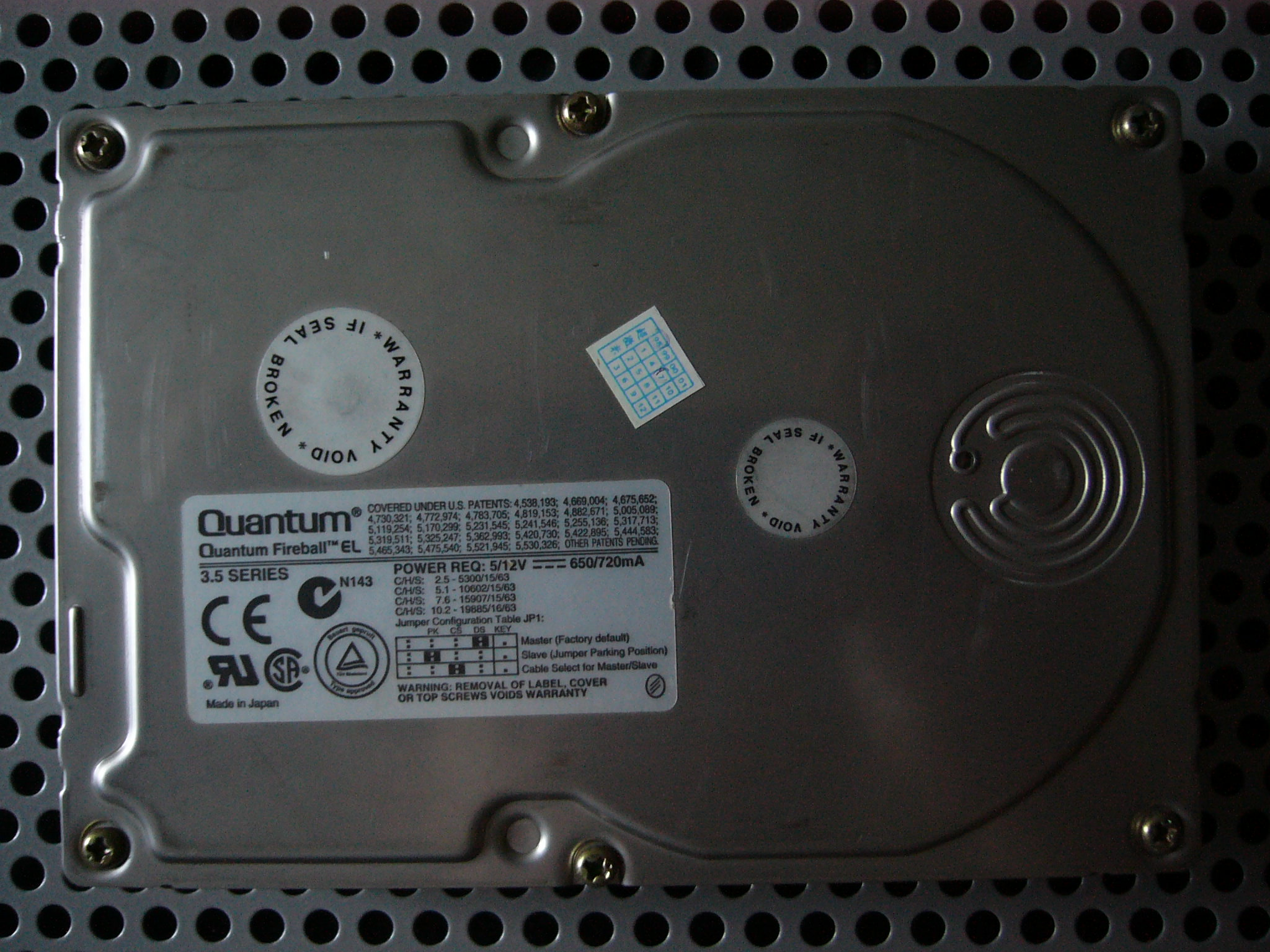 Quantum Fireball EL51A881 3.5吋硬碟正面